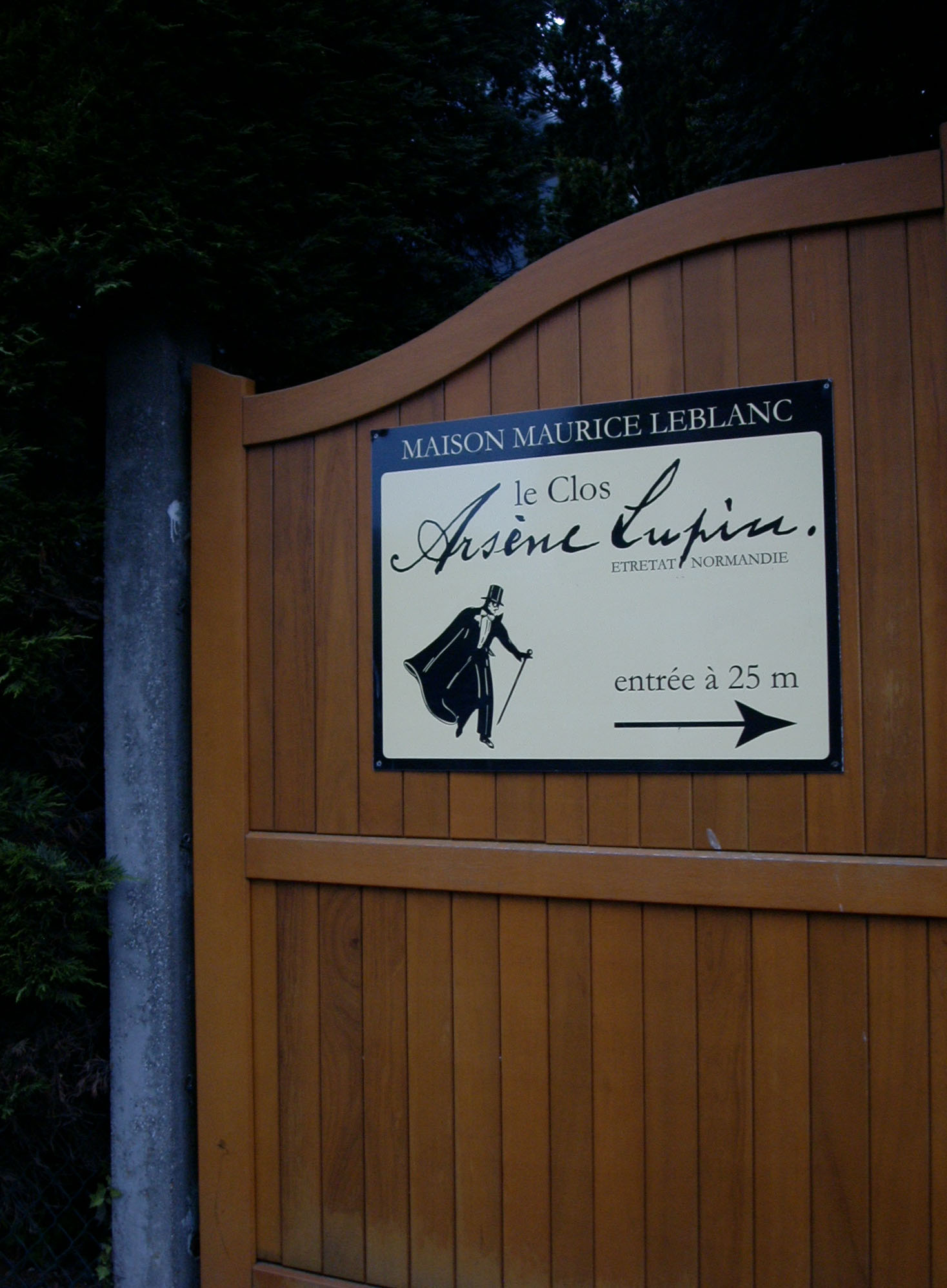 Wegweiser zum Museum "Le Clos Arsène Lupin, Maison Maurice Leblanc" in Étretat Datum: 08.05.2011 Urheber: M. Pfeiffer alias Gordito1869 Quelle: privates Fotoarchiv des Urhebers